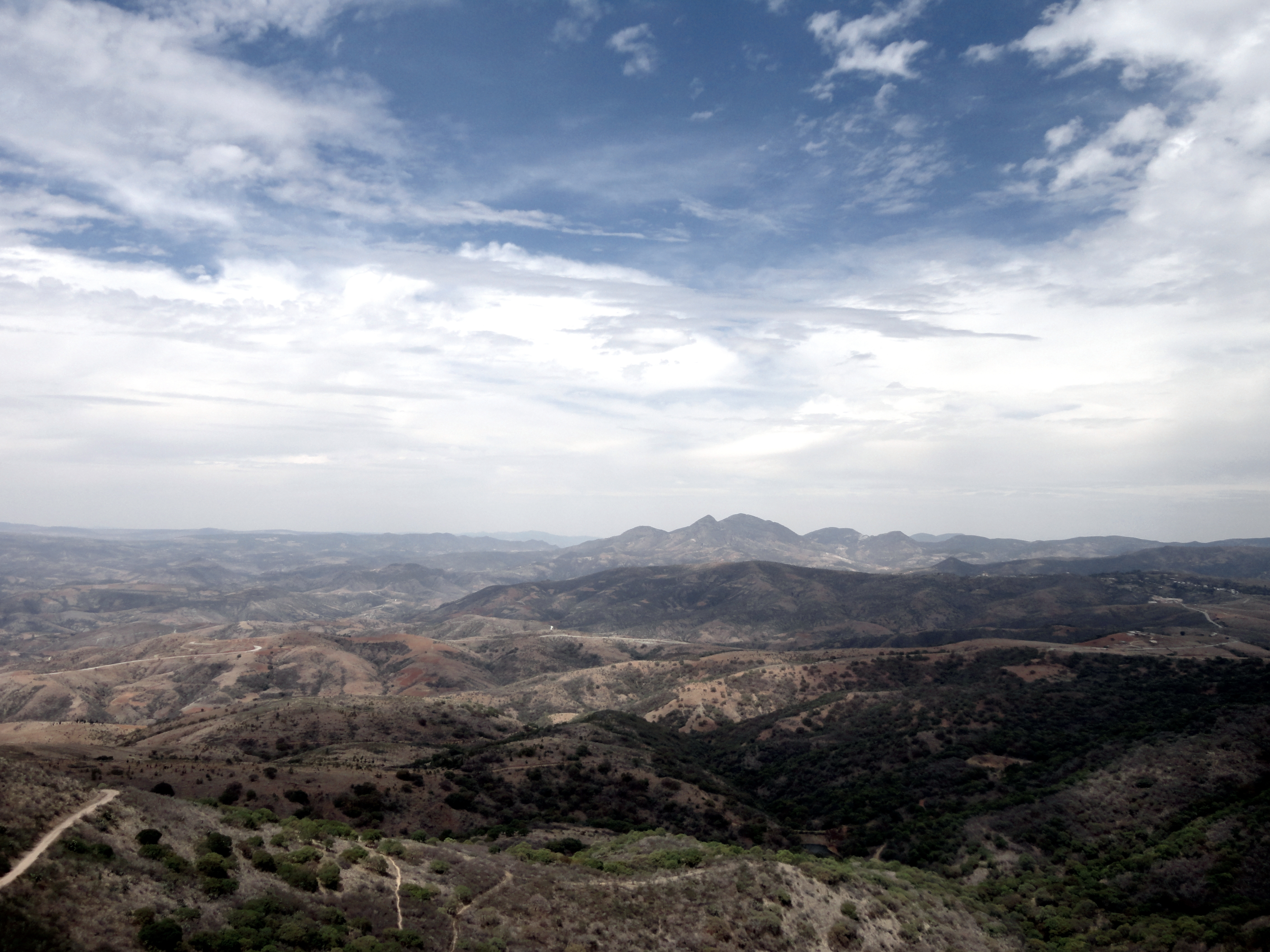 Paisaje de Guanajuato, vista desde el Cerro del Cubilete - Silao, Gto, México.